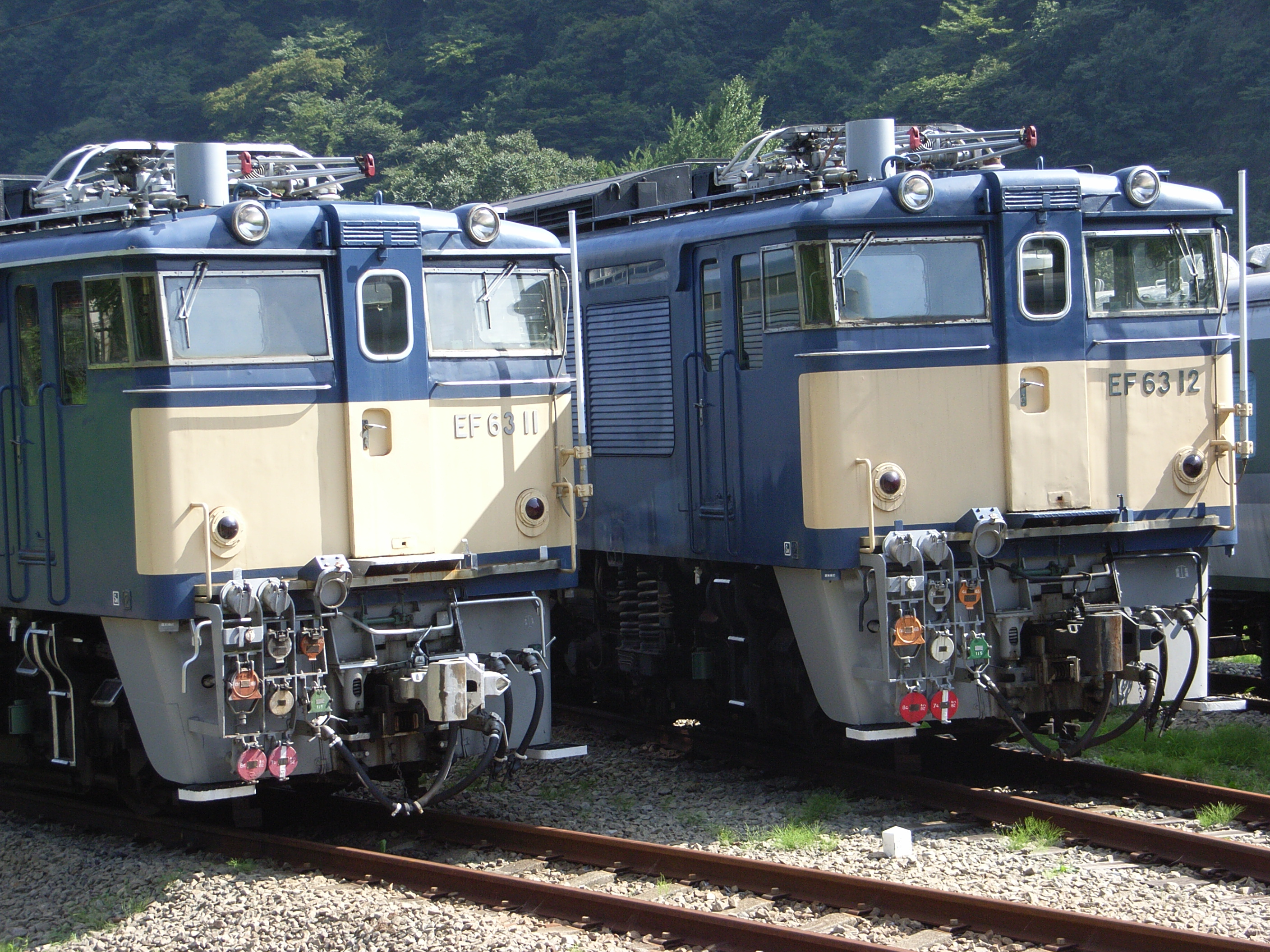 碓氷峠鉄道文化村